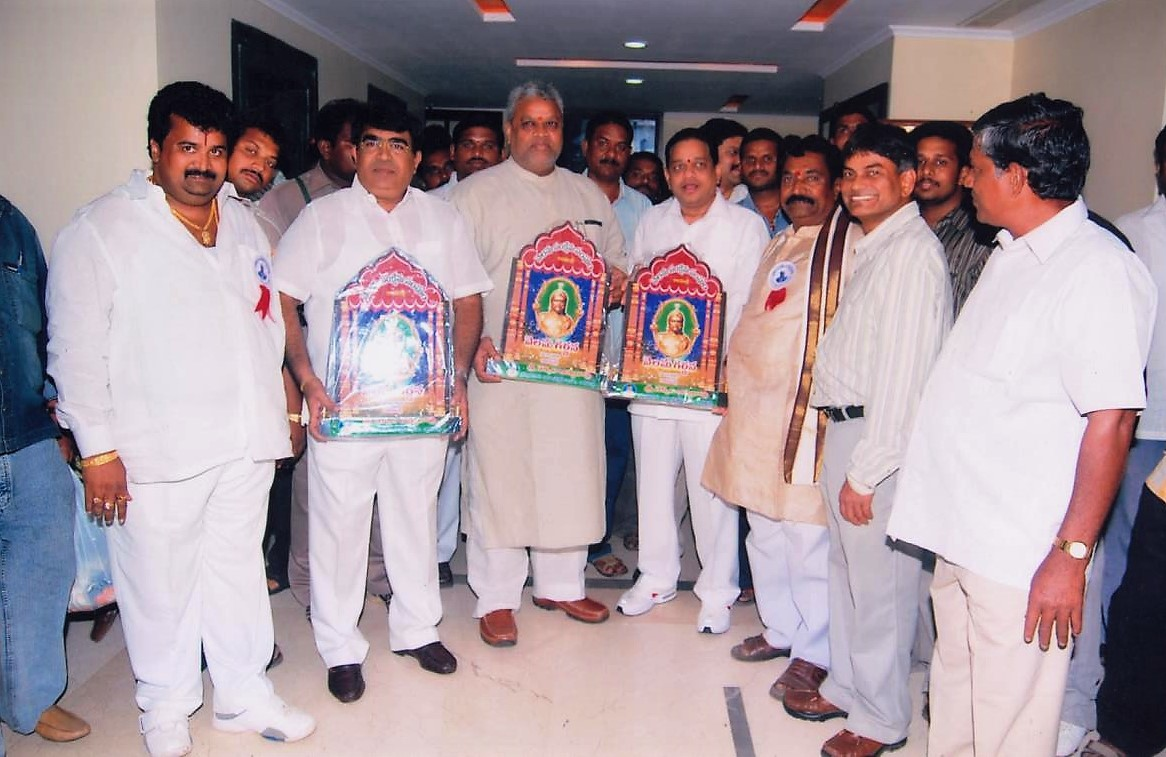 దివంగత ఎర్రంనాయుడు తో తెంటు సత్యనారాయణ